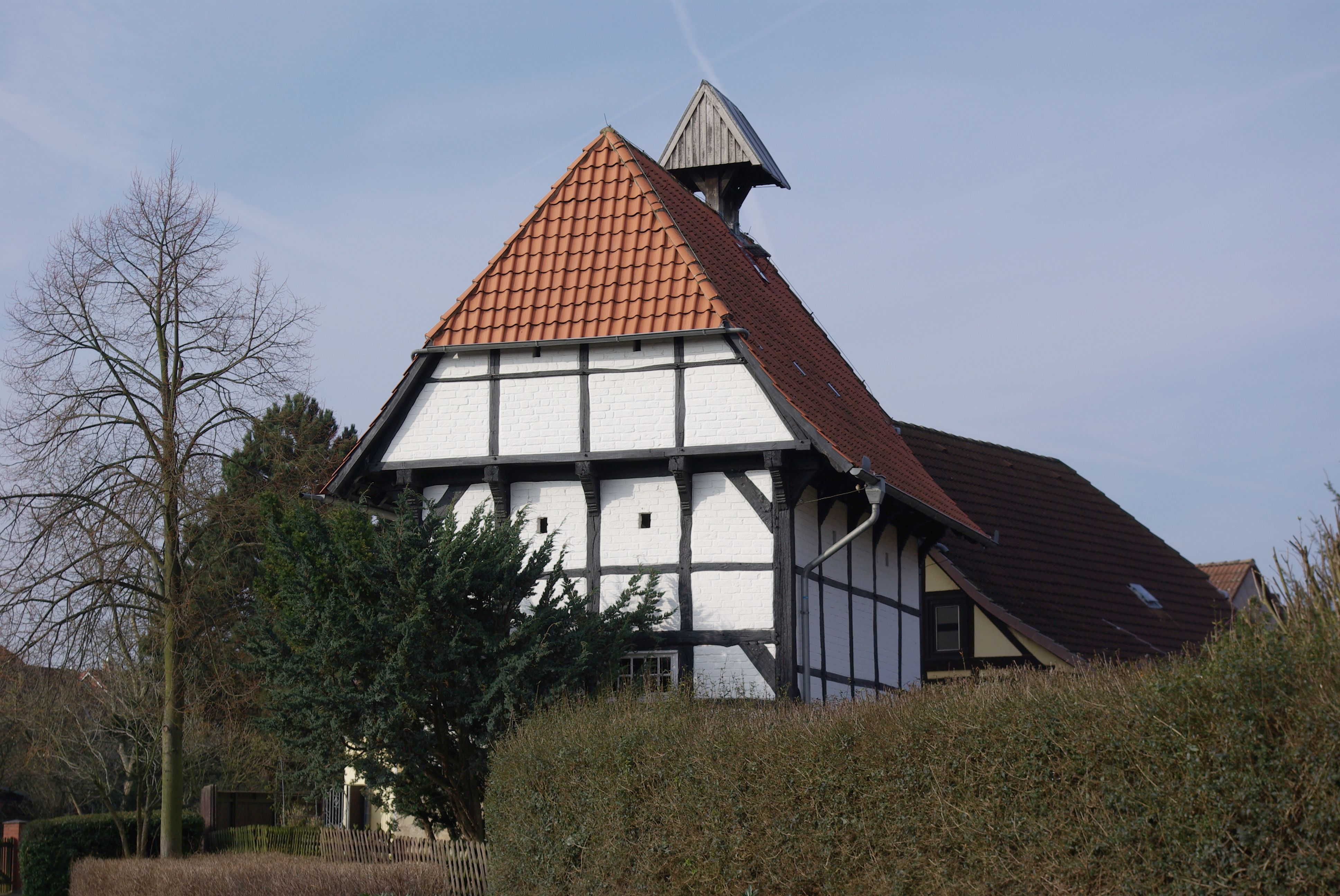 Hemmingen, Niedersachsen, Ortsteil Devese, die Kapelle, geotag in exif